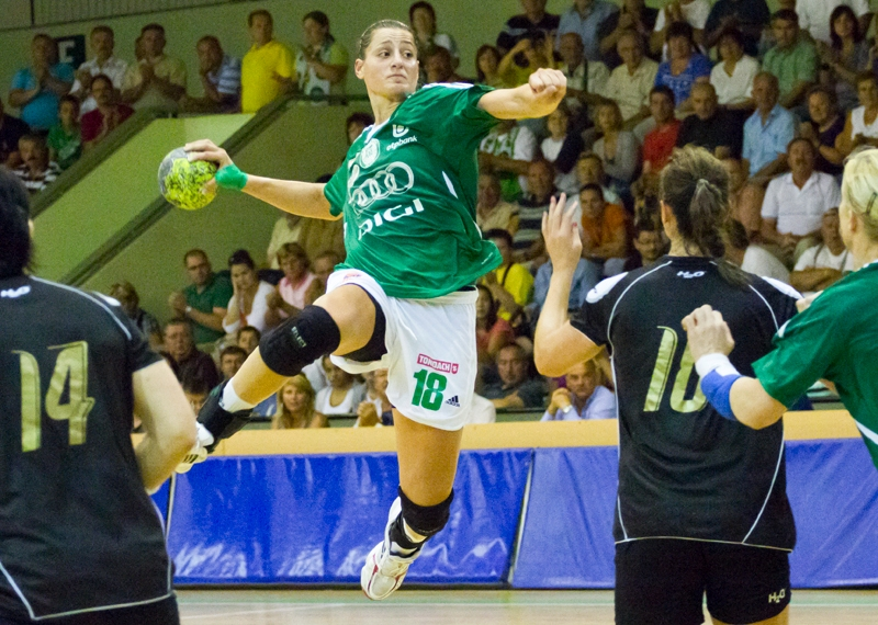 Eduarda Amorim